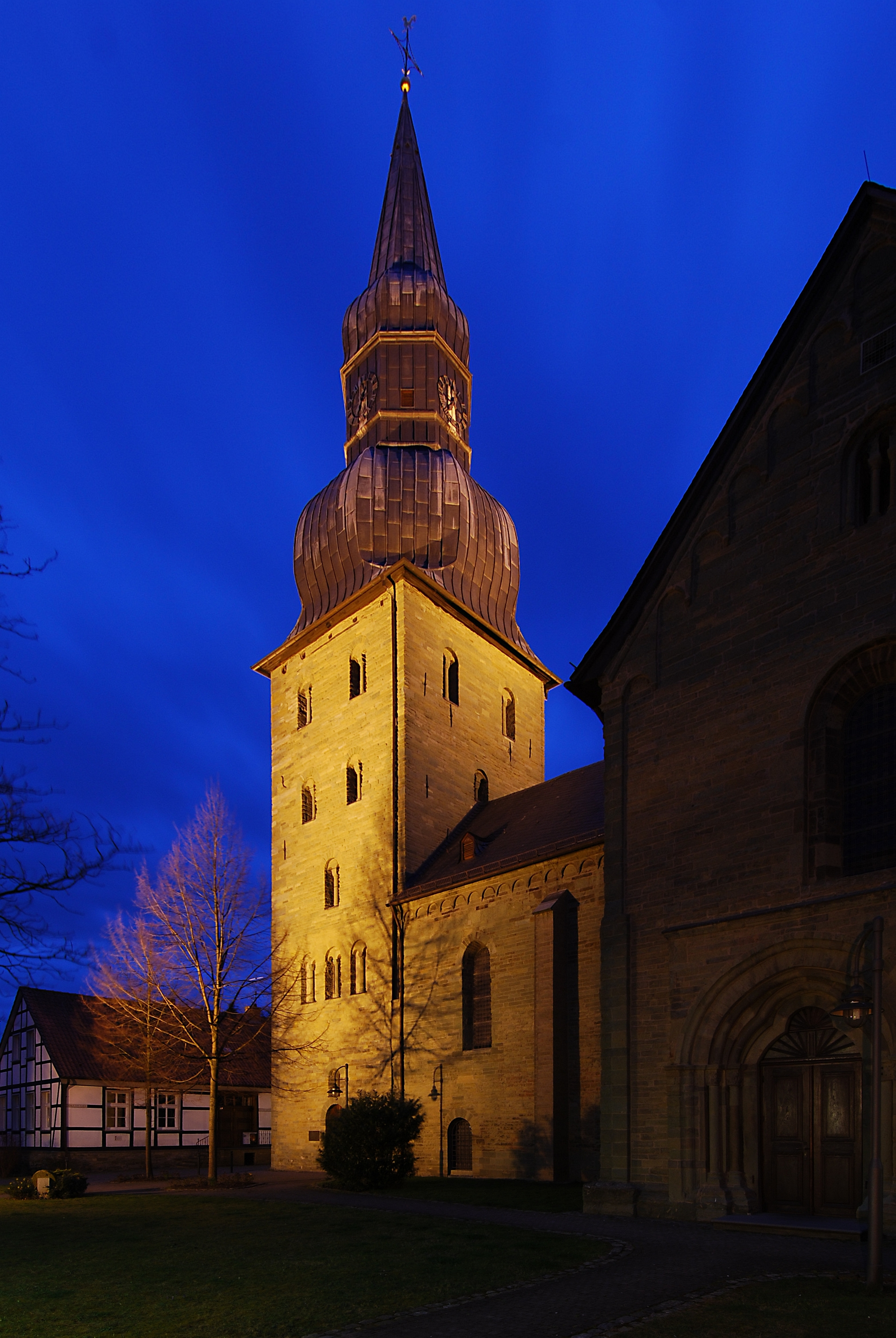 Kath. Pfarrkirche St. Stephanus an der Straße An der Kirche im Ortsteil Oestinghausen der Gemeinde Lippetal im Kreis Soest in Nordrhein-Westfalen This is a photograph of an architectural monument.